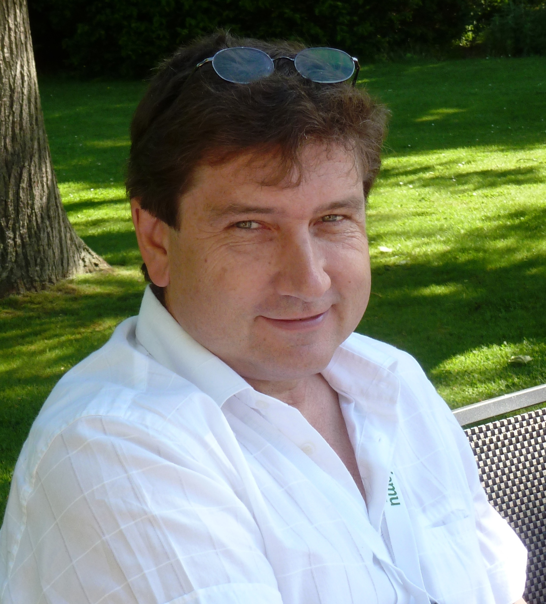 Robert Sterba, Radrennfahrer, Fahrradproduzent und Sammler aus der Tschechei (Tschechoslowakei)